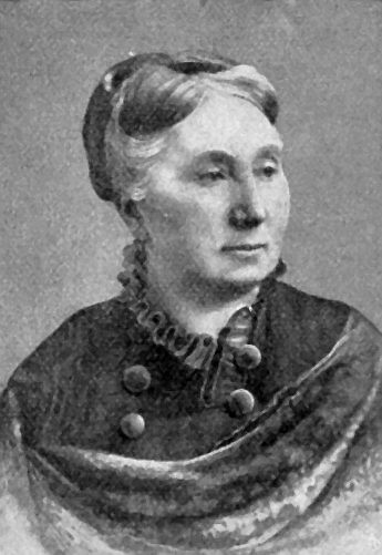 Emma Herwegh in späten Jahren